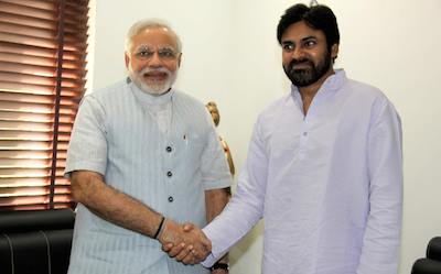 Shri Narendra Modi Meets Pawan Kalyan